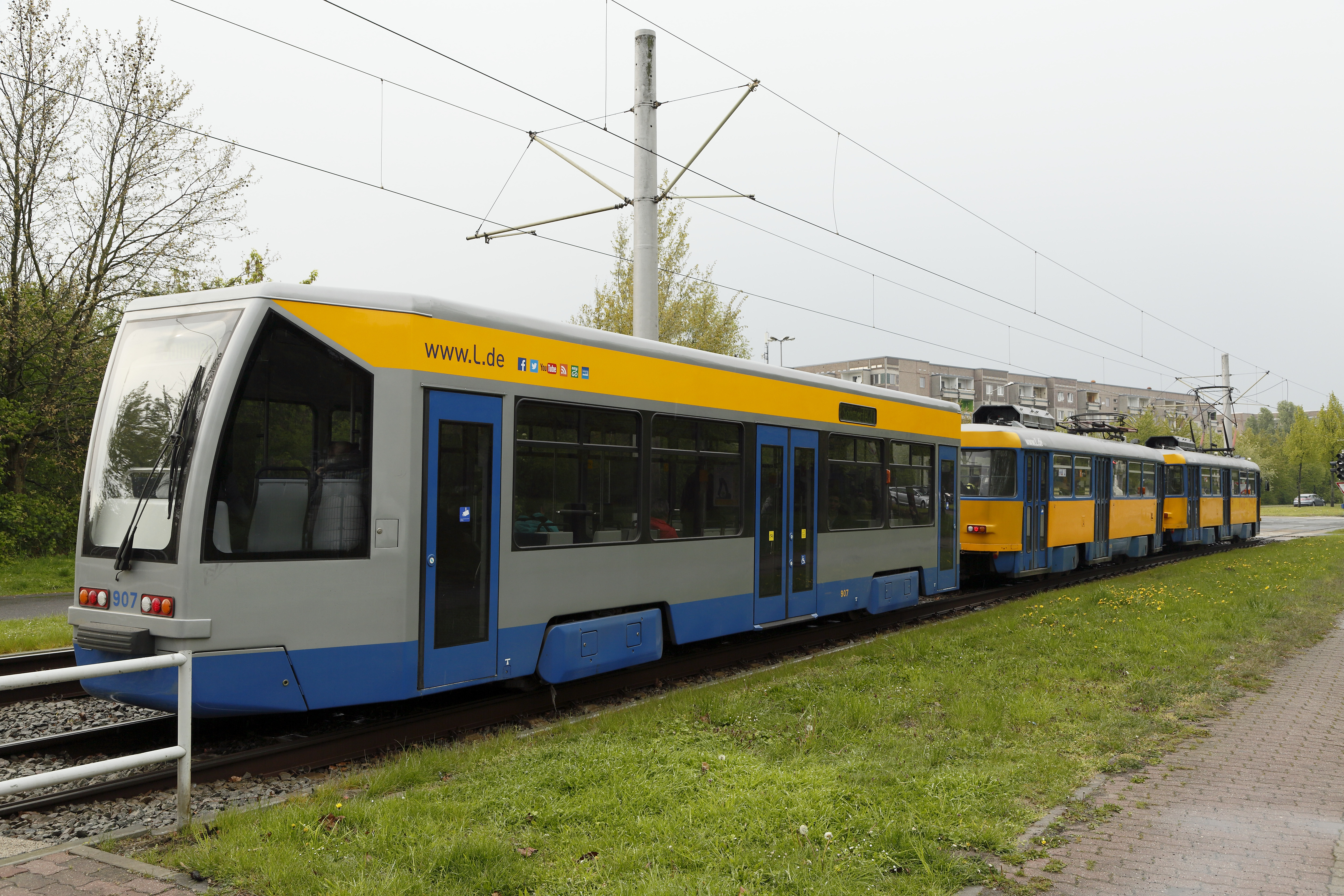 Niederflurbeiwagen Typ 68, B-Ende. An diesem Ende gibt es einen Hilfsführerstand, deshalb gibt es am Heckfenster Scheibenwischer. Der Zug steht vor dem Wegübergang, die Straßenbahnbevorrechtigung ist für die autogläubige Stadtverwaltung keine denkbare Option.